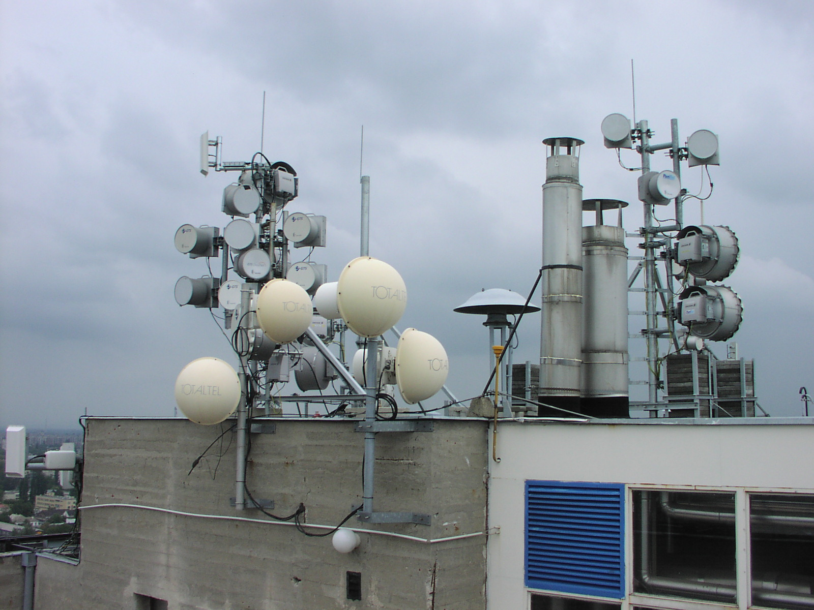 Mikrohullámú antennák fürtjei egy toronyház tetején